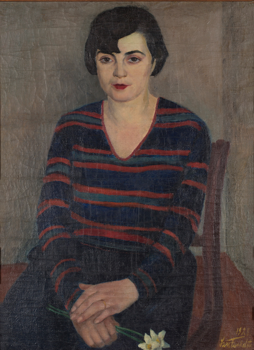 Portret żony 1928